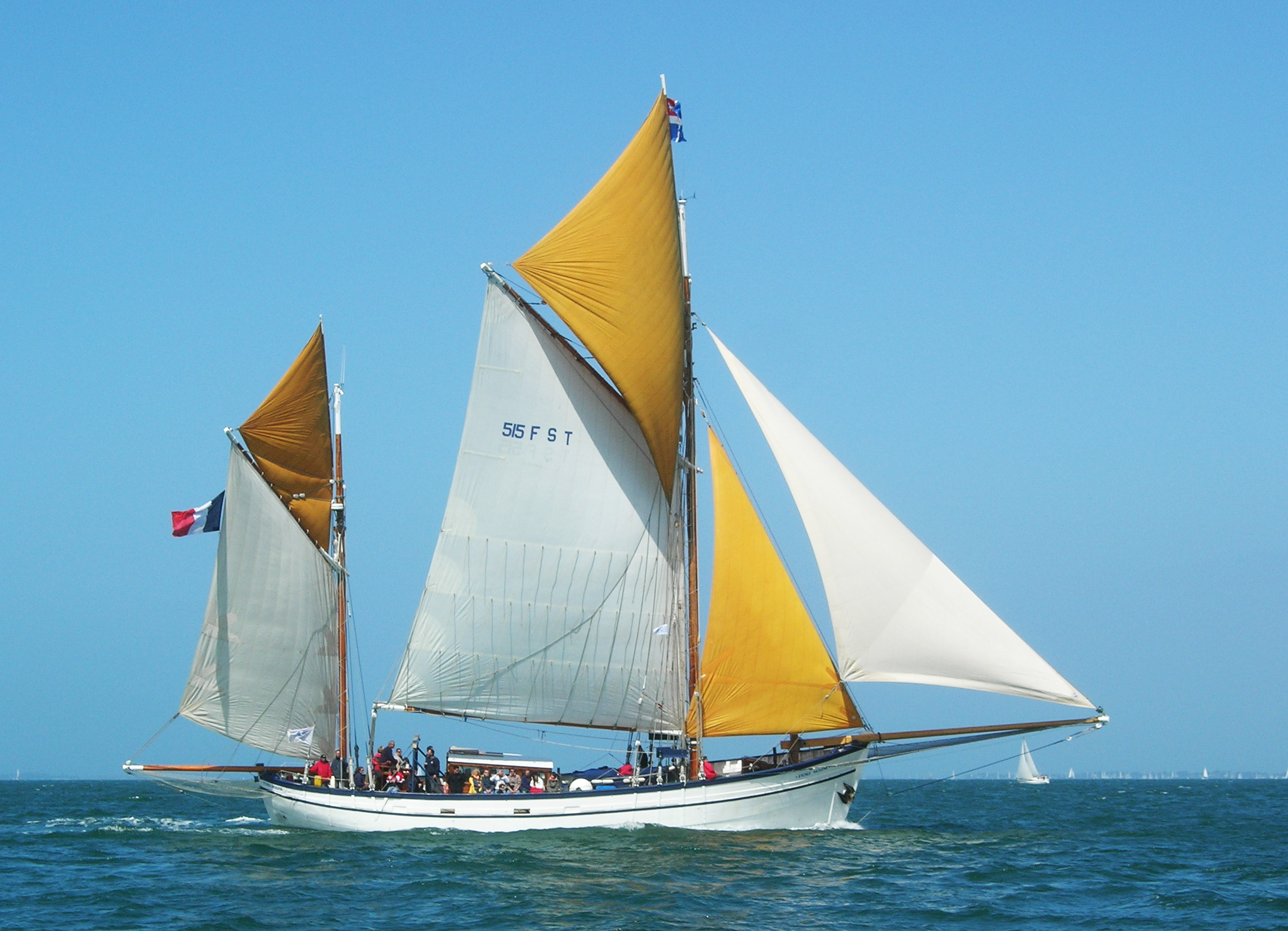 L'Etoile Molene (voile no. «515 F S T») durant la Semaine du Golfe du Morbihan